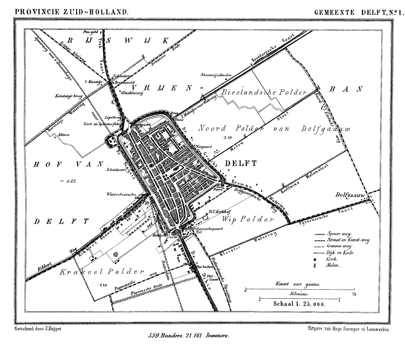 Kaart van Delft uit Gemeente Atlas van Nederland, J. Kuyper 1865-1870, Uitgave Hugo Suringar Leeuwarden.